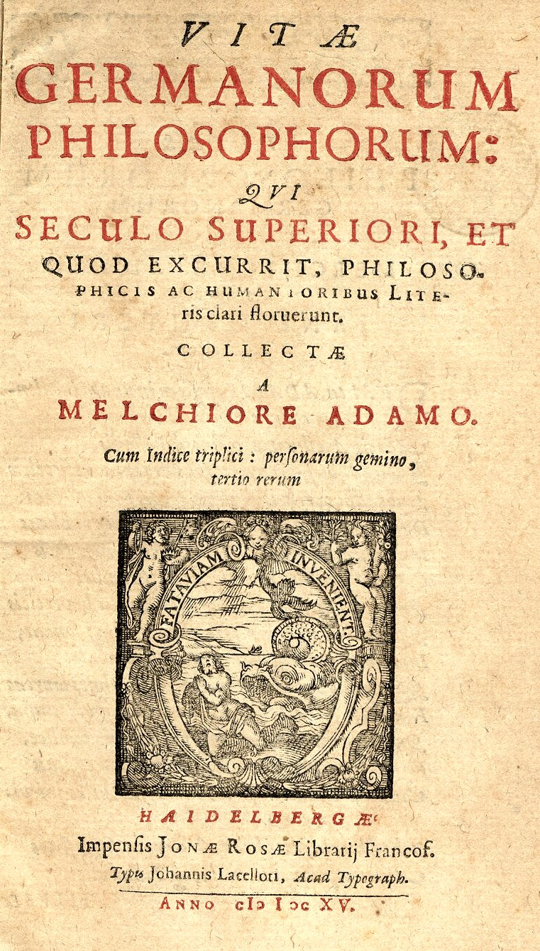 Vitarum Germanorum philosoporum, libri Melchioris Adam, titulus